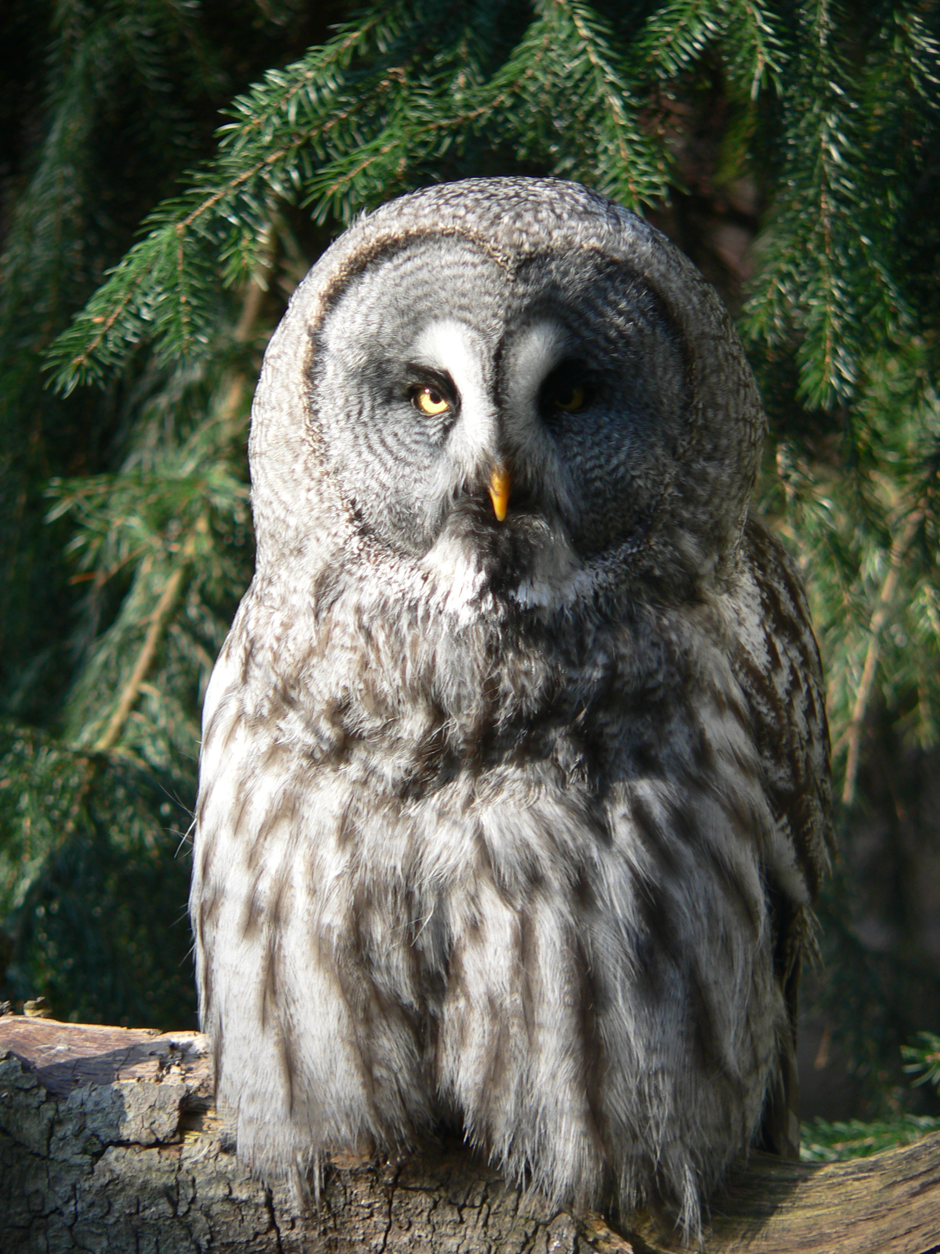 STrix nebulosa